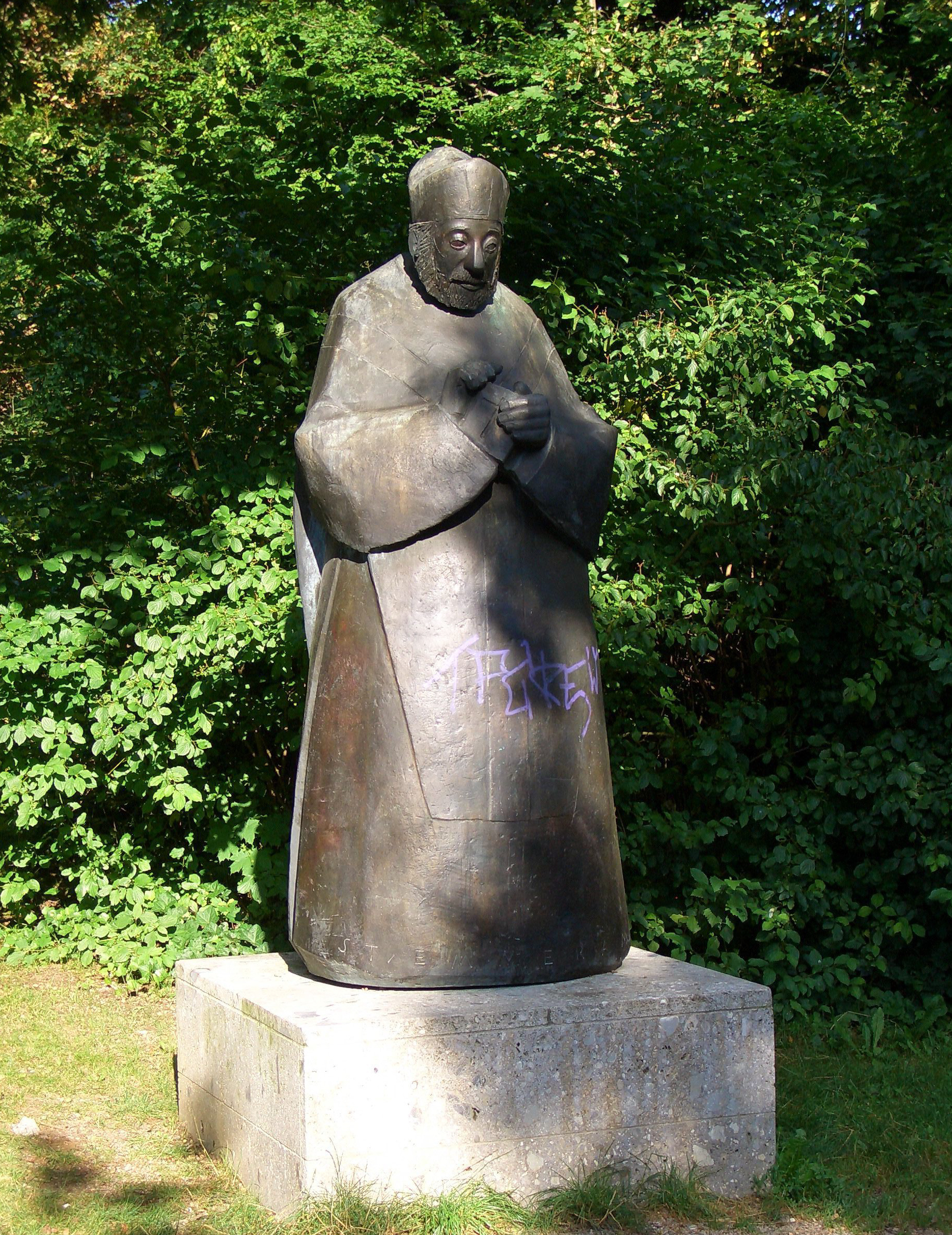 Standbild des heiligen Emmeram in München, nahe der Emmerams-Brücke von Rolf Nida-Rümelin